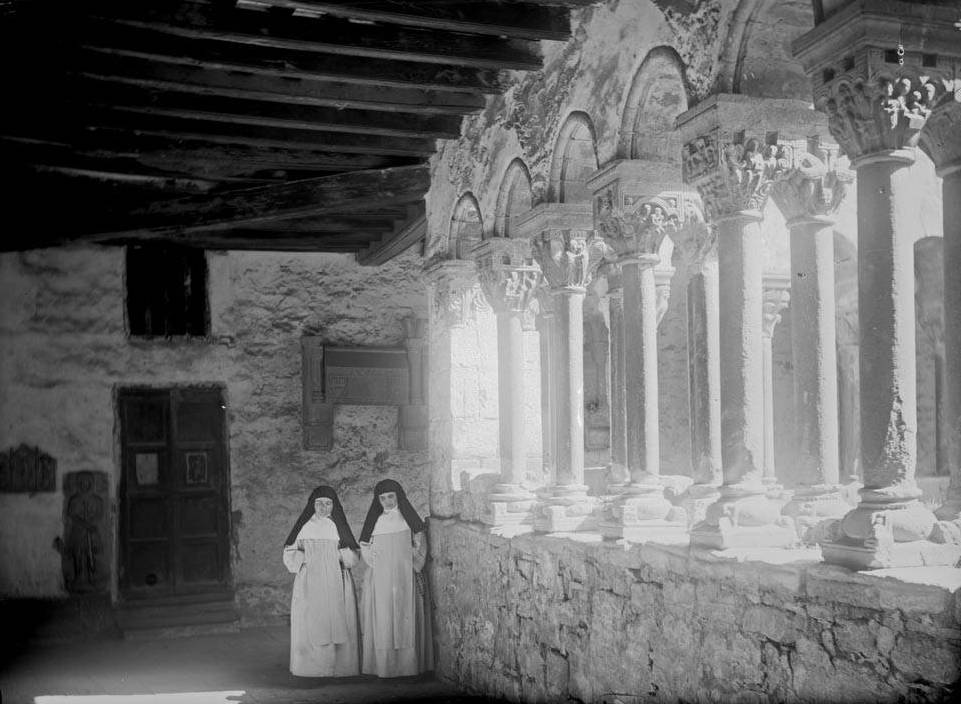 Imatge